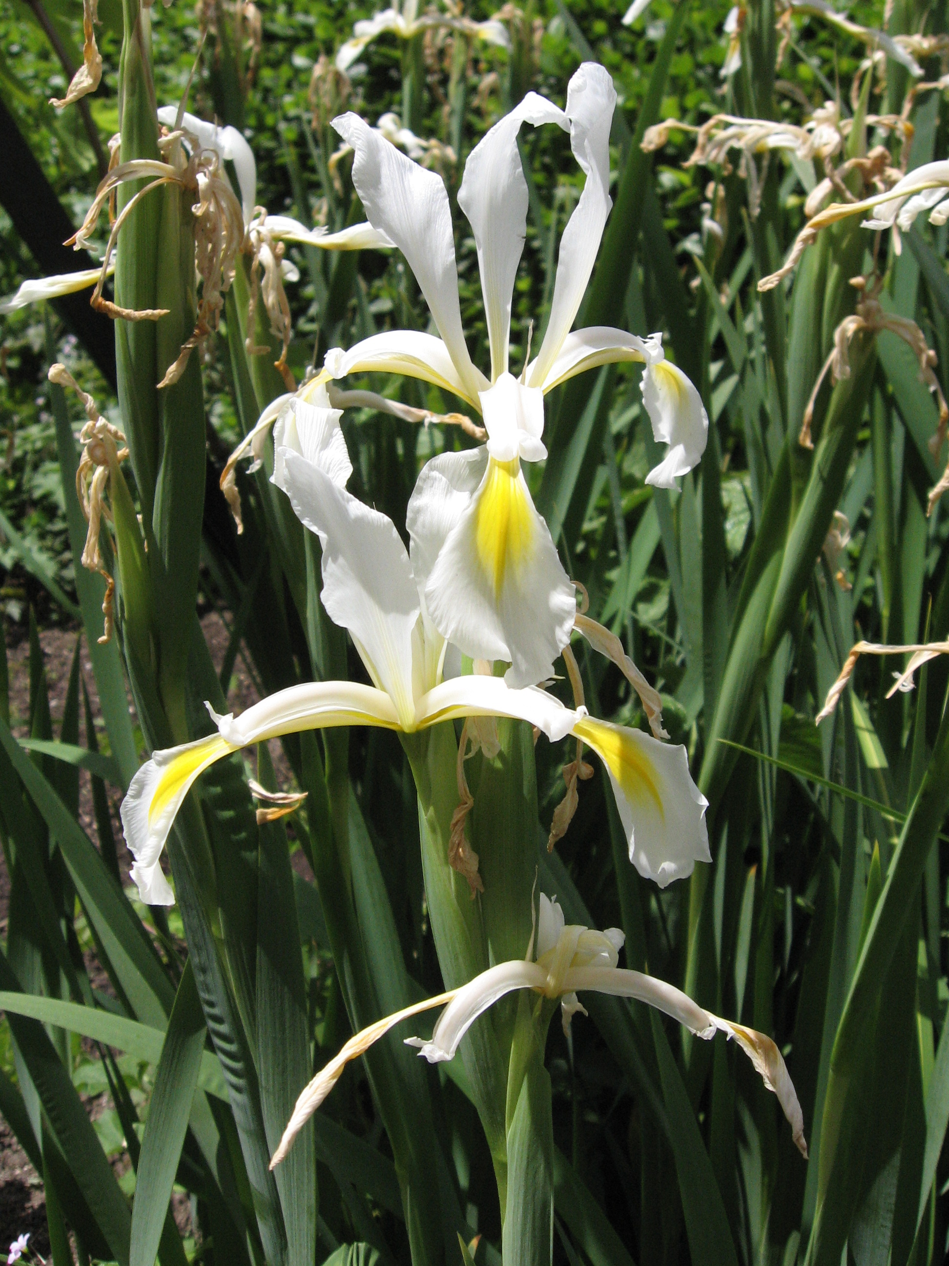 Iris spuria Garden hybrid. Real Jardín Botánico de Madrid.